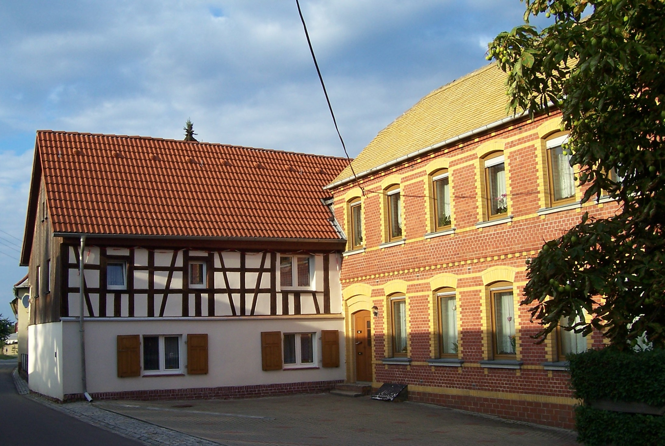 Ehemaliges Gasthaus und ehemalige Schule im Ortsteil Trautzschen der Gemeinde Elstertrebnitz